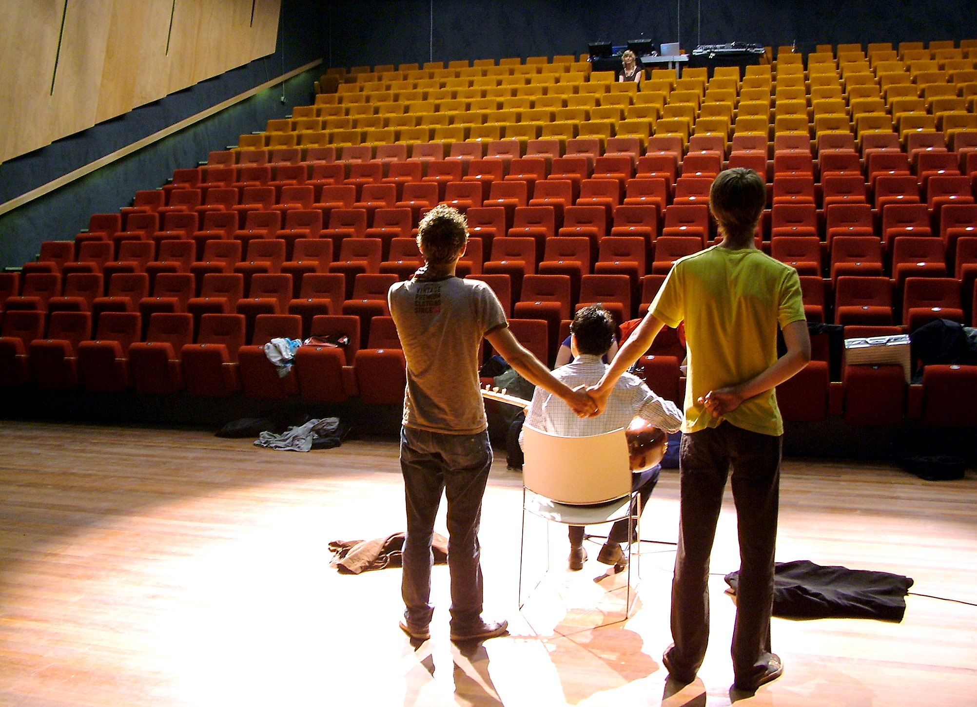 Cabaretgroep "Pril", winnaar VARA Cabaret battle 2008, in de DRU-fabriek (Ulft)